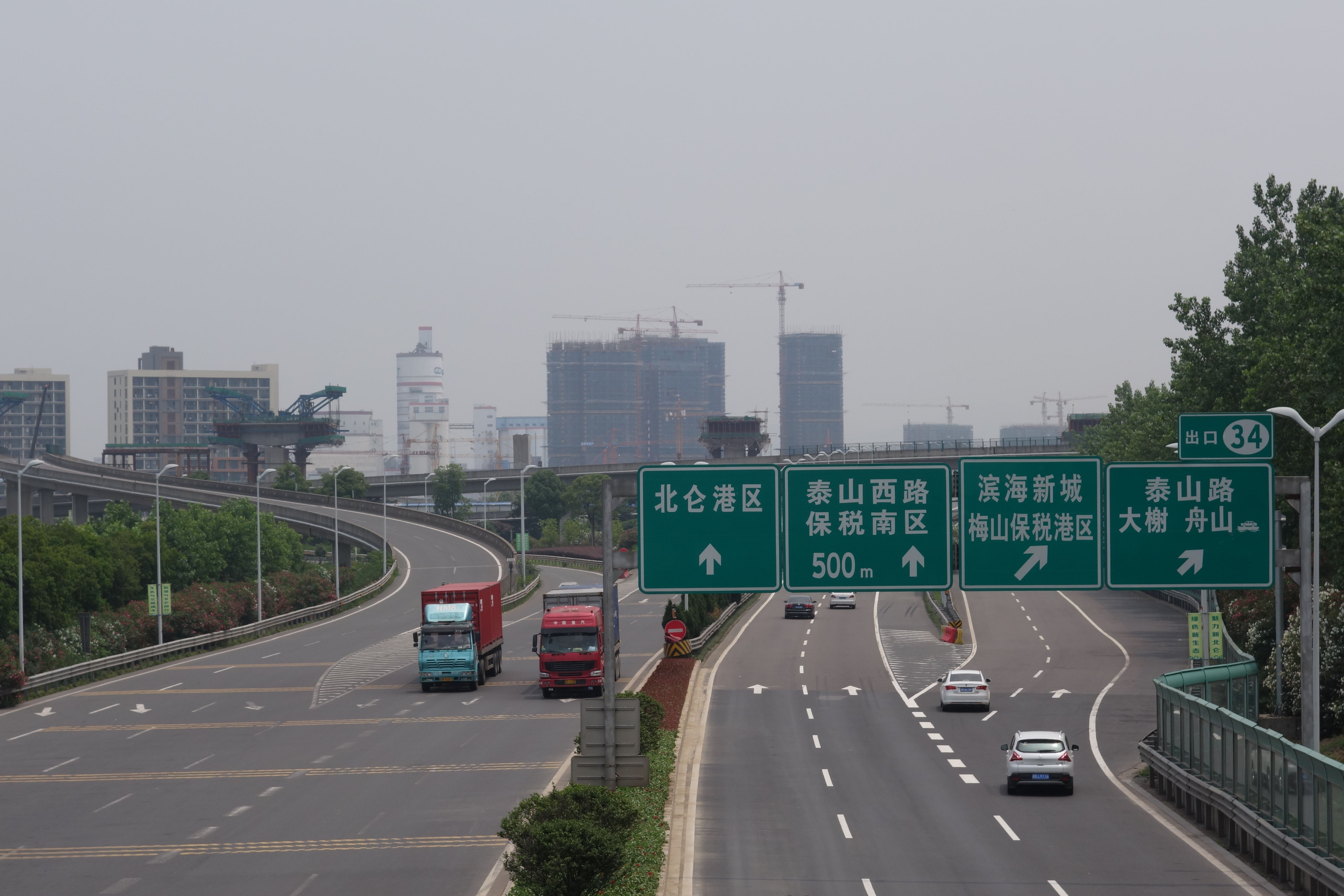 浙高速S1线